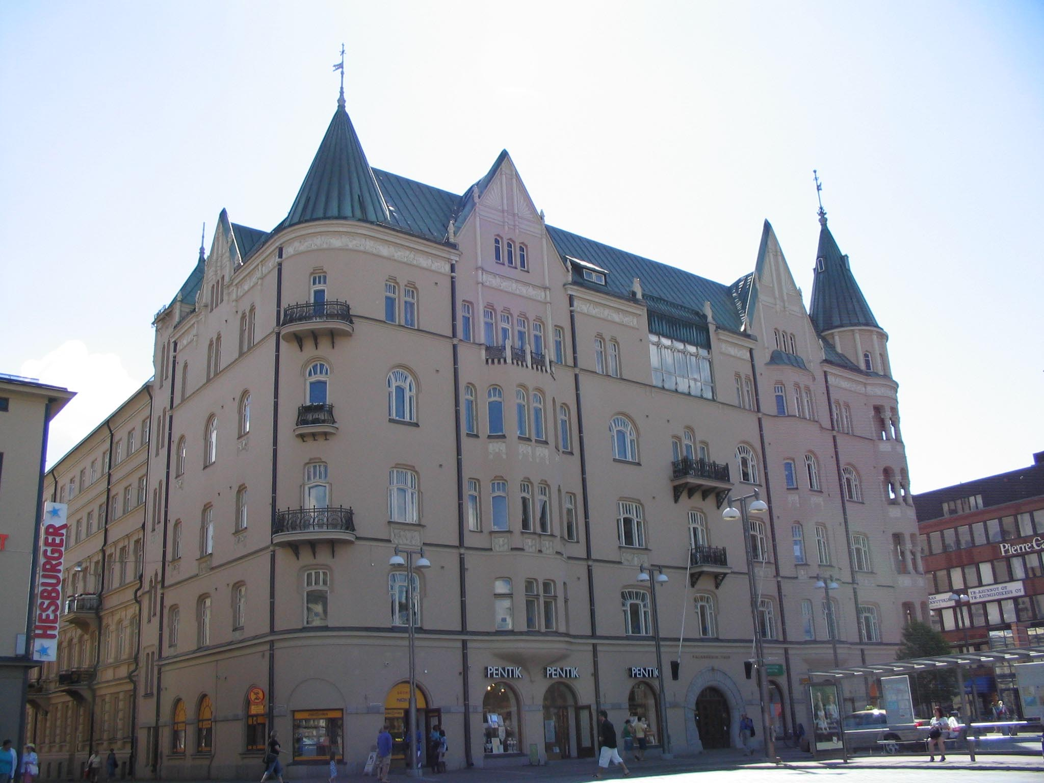 Palanderin talo Tampereella Hämeenkadun varrella